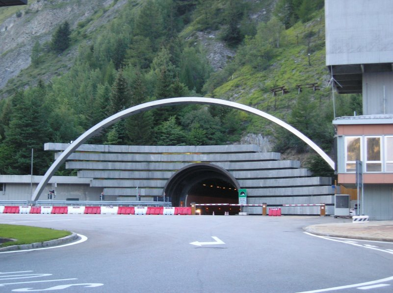 Entrata del tunnel del Monte Bianco, lato italiano